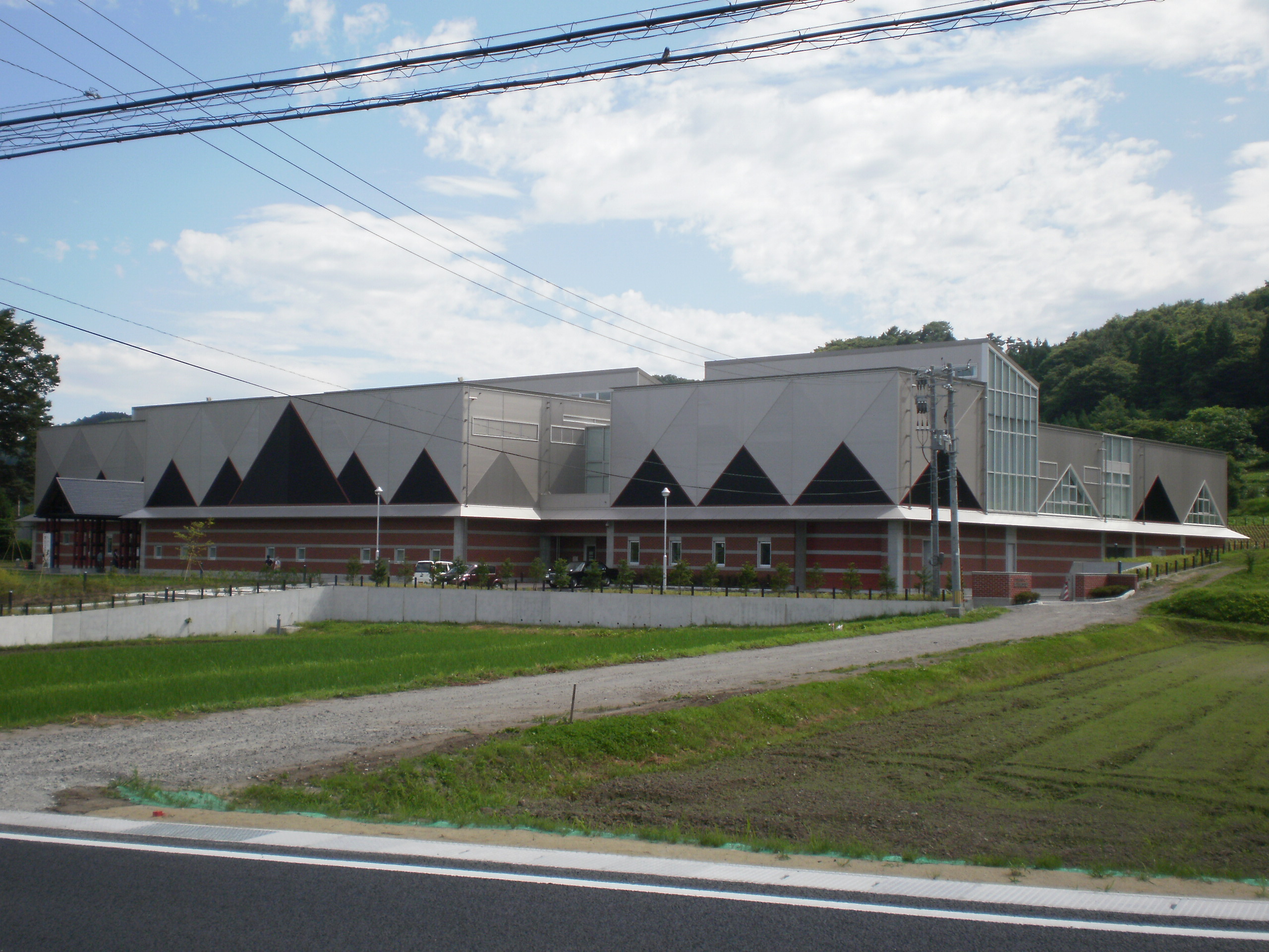 八戸市埋蔵文化財センター 是川縄文館